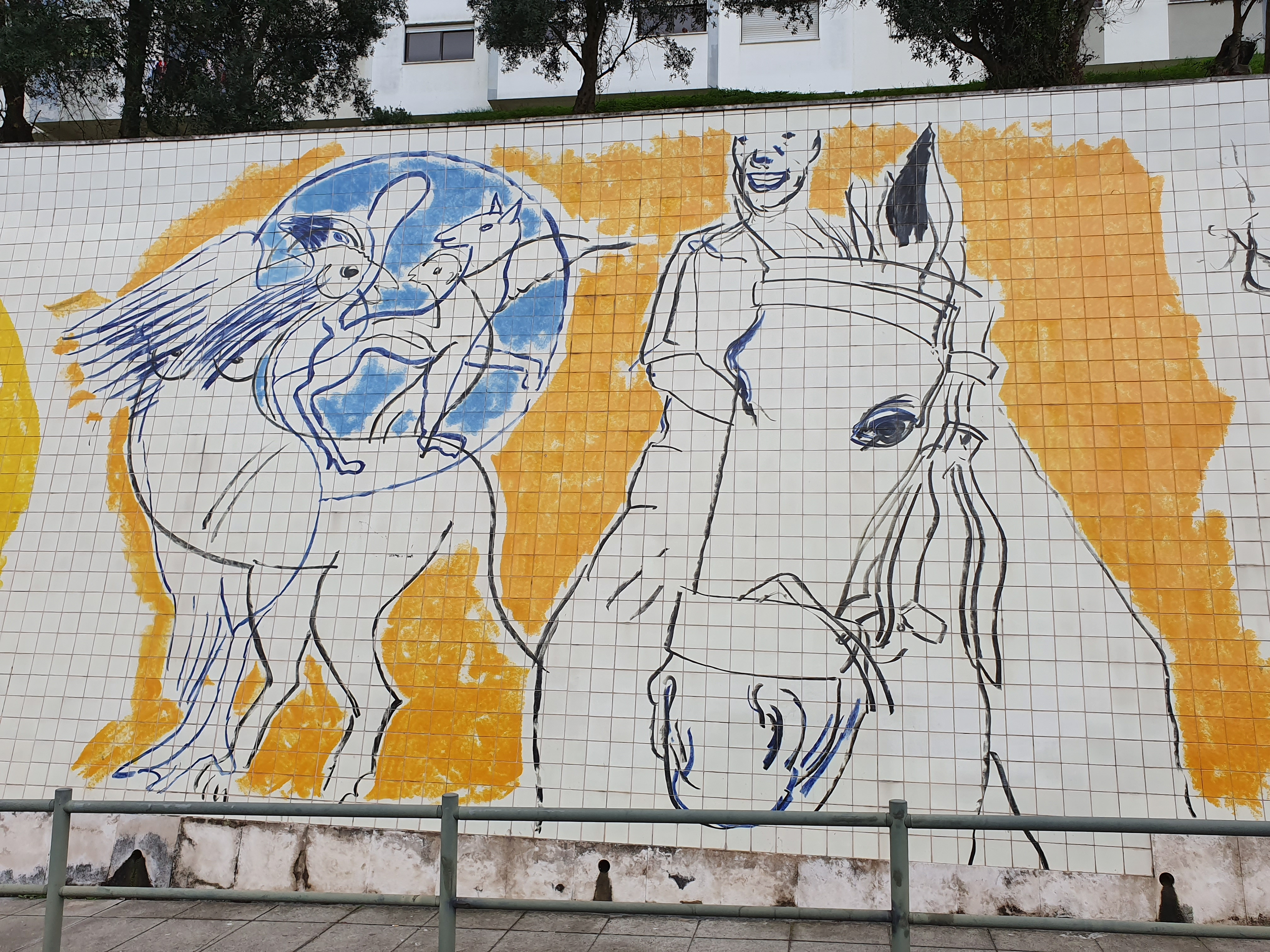 Pormenor de um dos três painéis de azulejos de 2001-2003 com desenho de Graça Morais, em Rinchoa-Rio de Mouro. Dois dos painéis estão colocados em ambos os lados do viaduto ferroviário Rinchoa-Rio de Mouro e o terceiro em muro do lado norte da estrada Marquês de Pombal, na Rinchoa, próximo do mesmo viaduto.